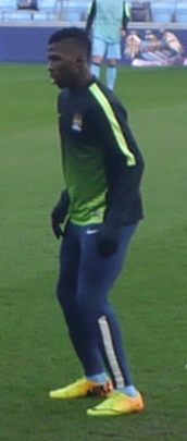 Kelechi Iheanacho avec Manchester City le 24 février 2015